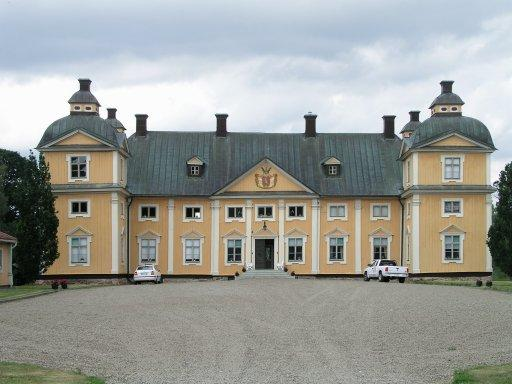 Schloss Gripenberg, Schweden